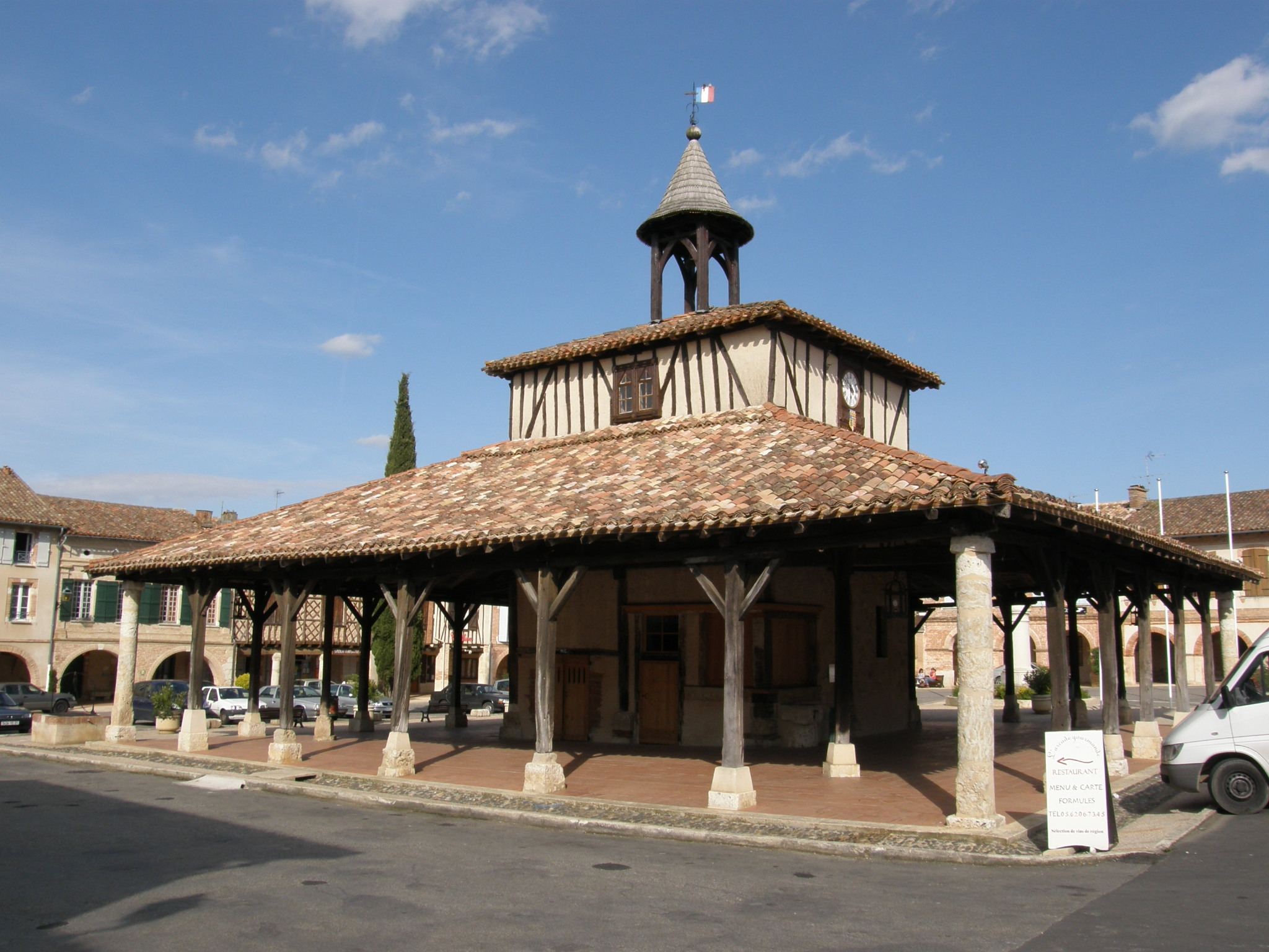 Halle de Cologne, Gers .